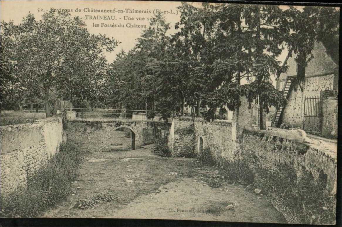 Carte postale ancienne représentant les fossés de l'ancien château de Tresneau, aux environs de Châteauneuf en Thymerais, dans le département de l'Eure-et-Loir, avec l'ancienne orthographe Traineau